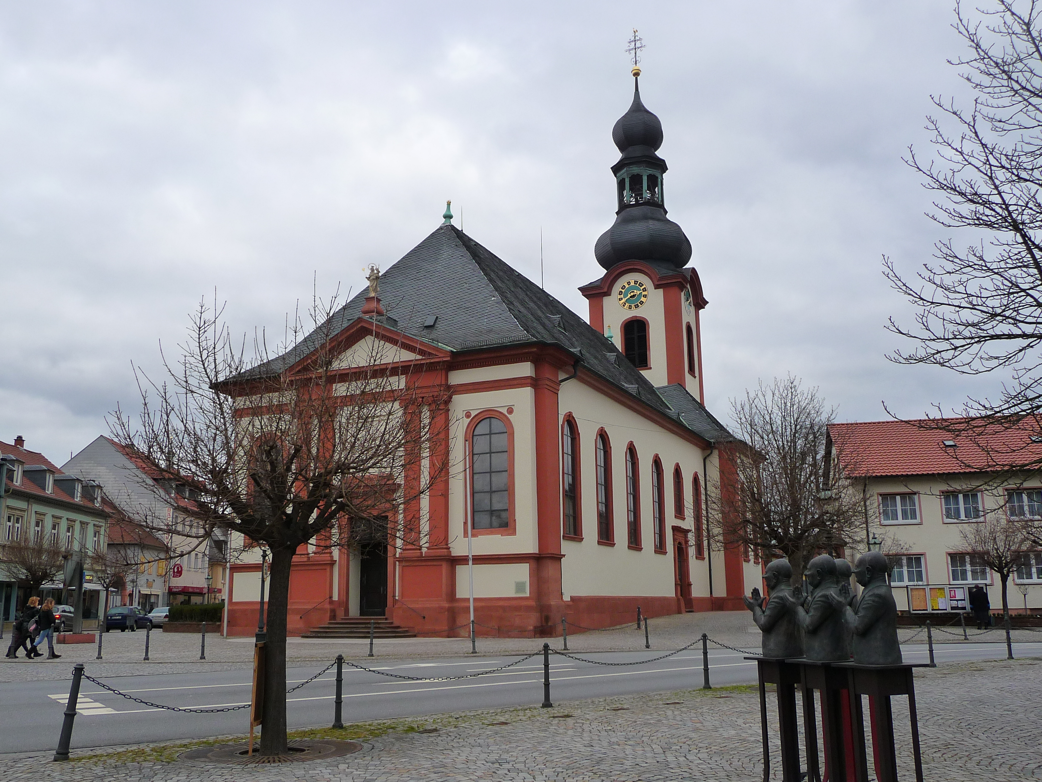 Katholische Kirche St. Pankratius in Schwetzingen (Rhein-Neckar-Kreis)